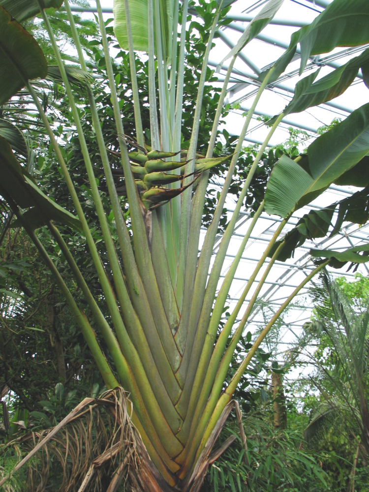 Ravenala madagascariensis fotographiert am 10.4.2005 im Zürcher Zoo